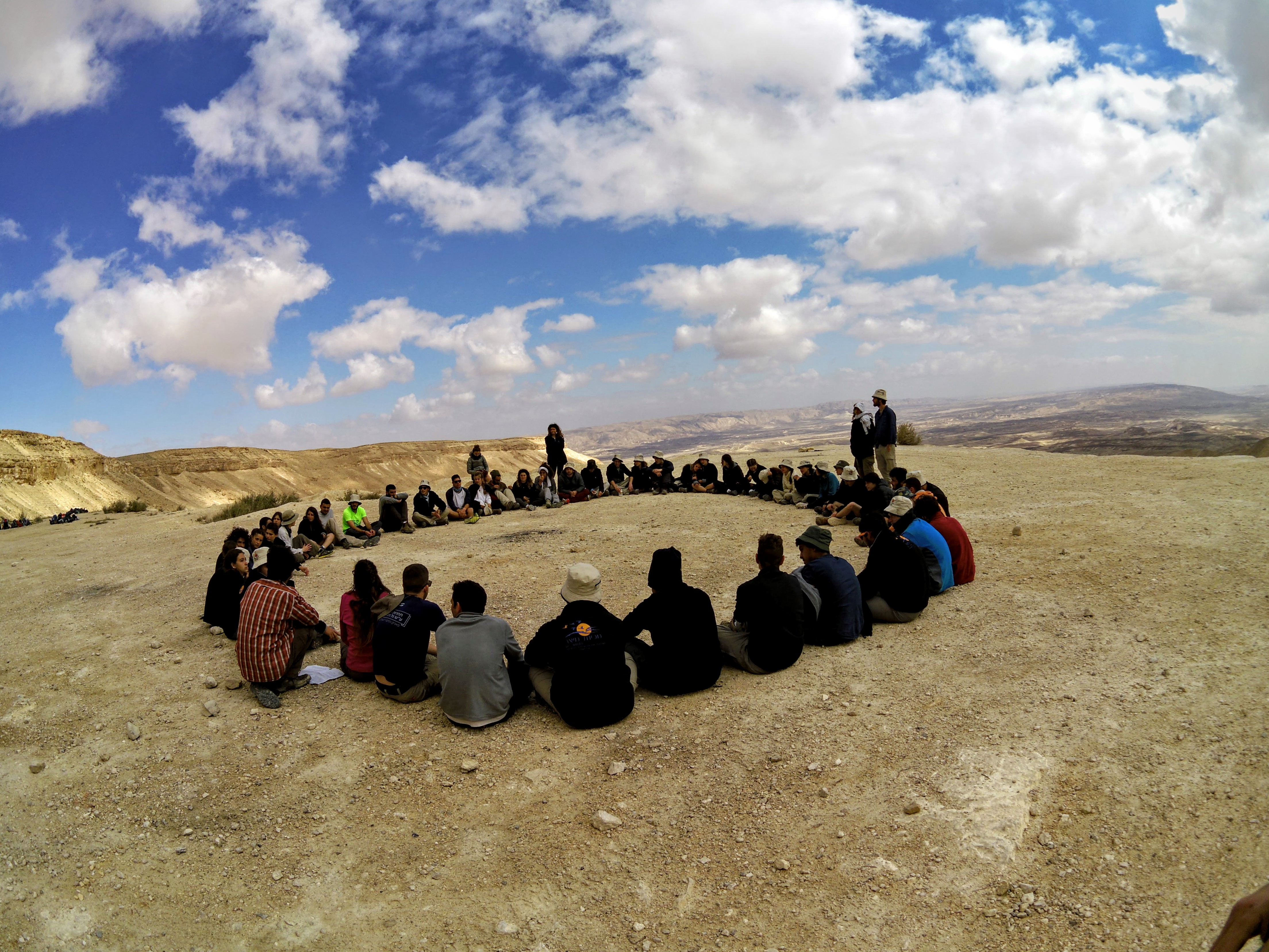 טיול מכינה במדבר